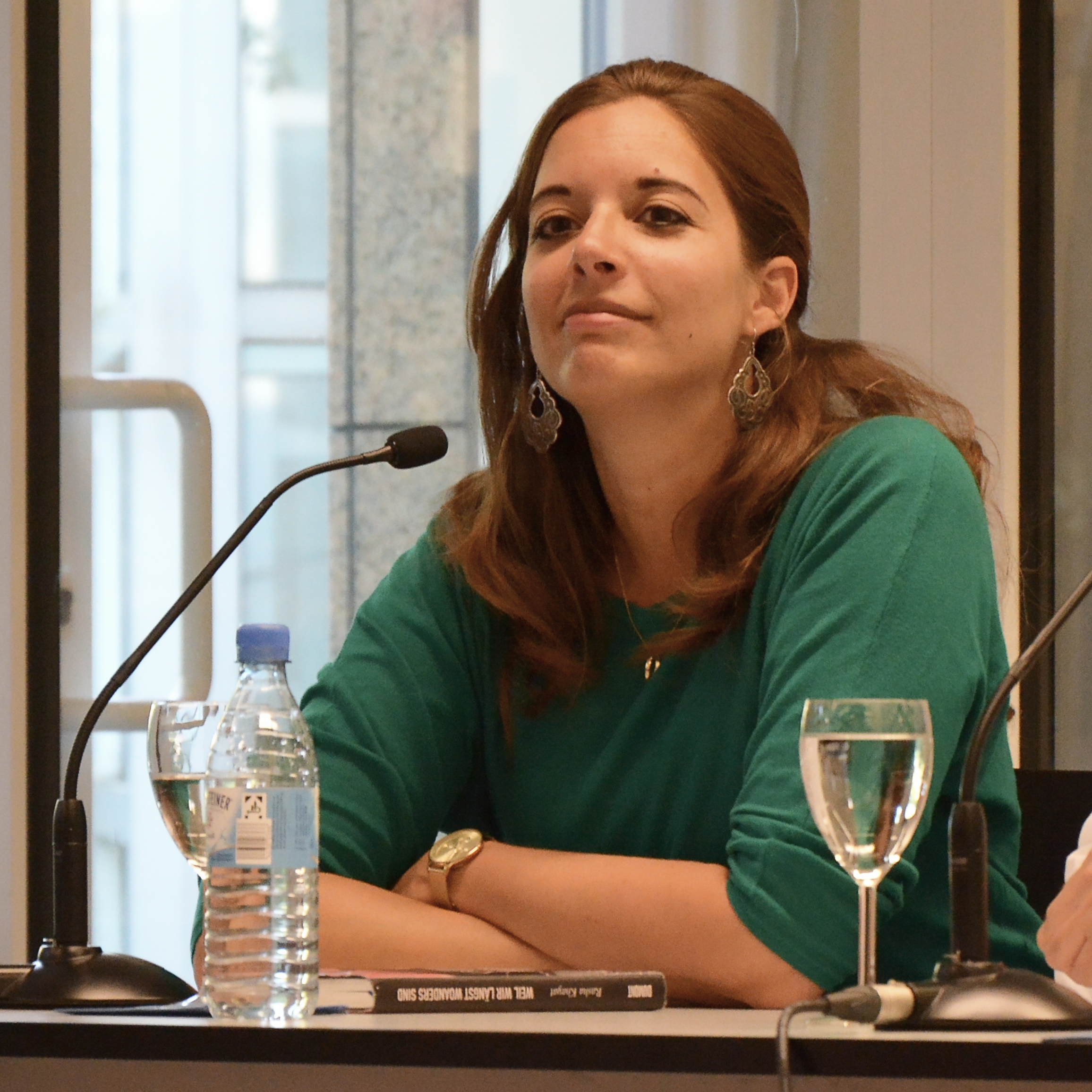 Rasha Khayat bei einer Lesung aus Weil wir längst woanders sind in der Zentralbibliothek Düsseldorf.